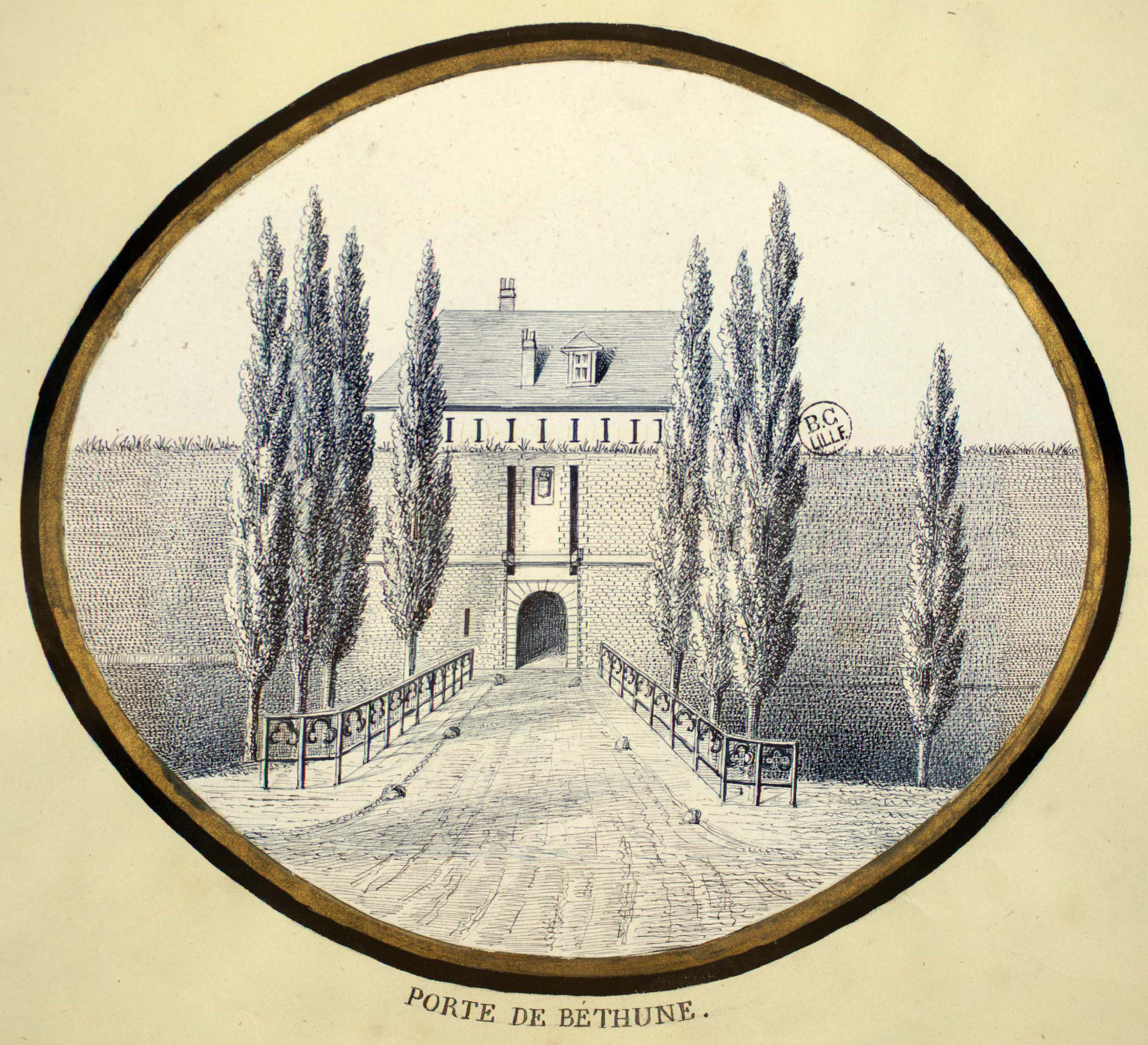 Planche extraite de l'ouvrage Album Lillois, Souvenirs d'un Artiste, par Baron.